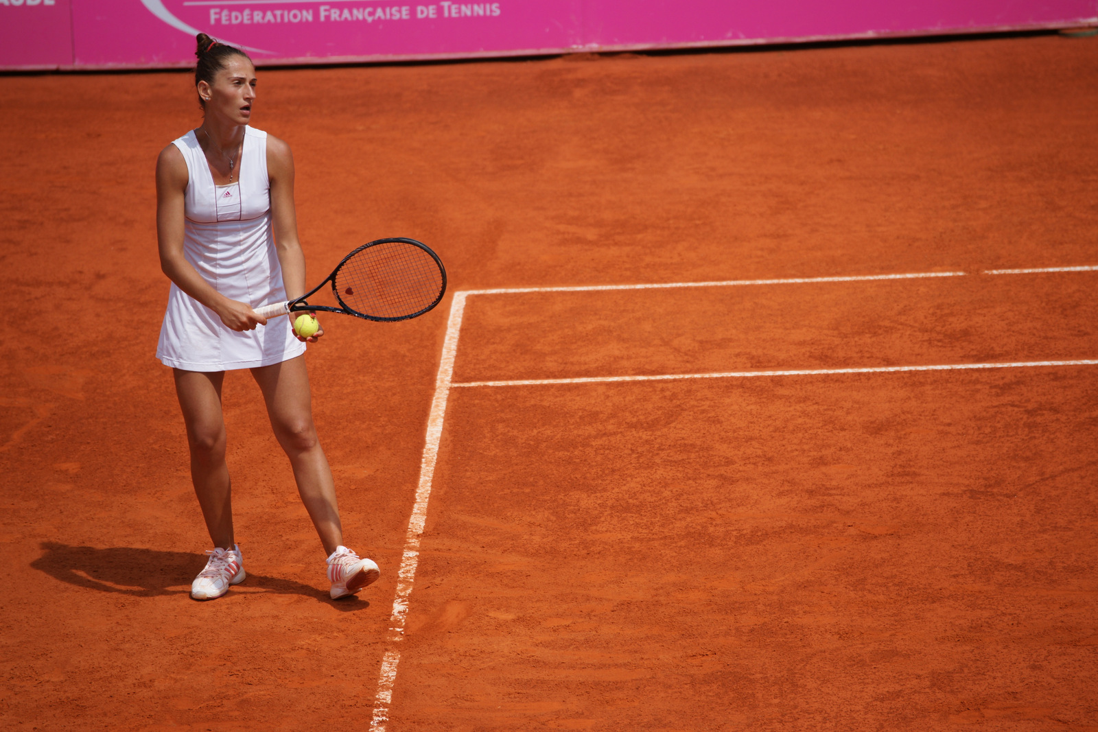 Alexandra Cadanțu, Open ITF Cagnes-sur-Mer 2013